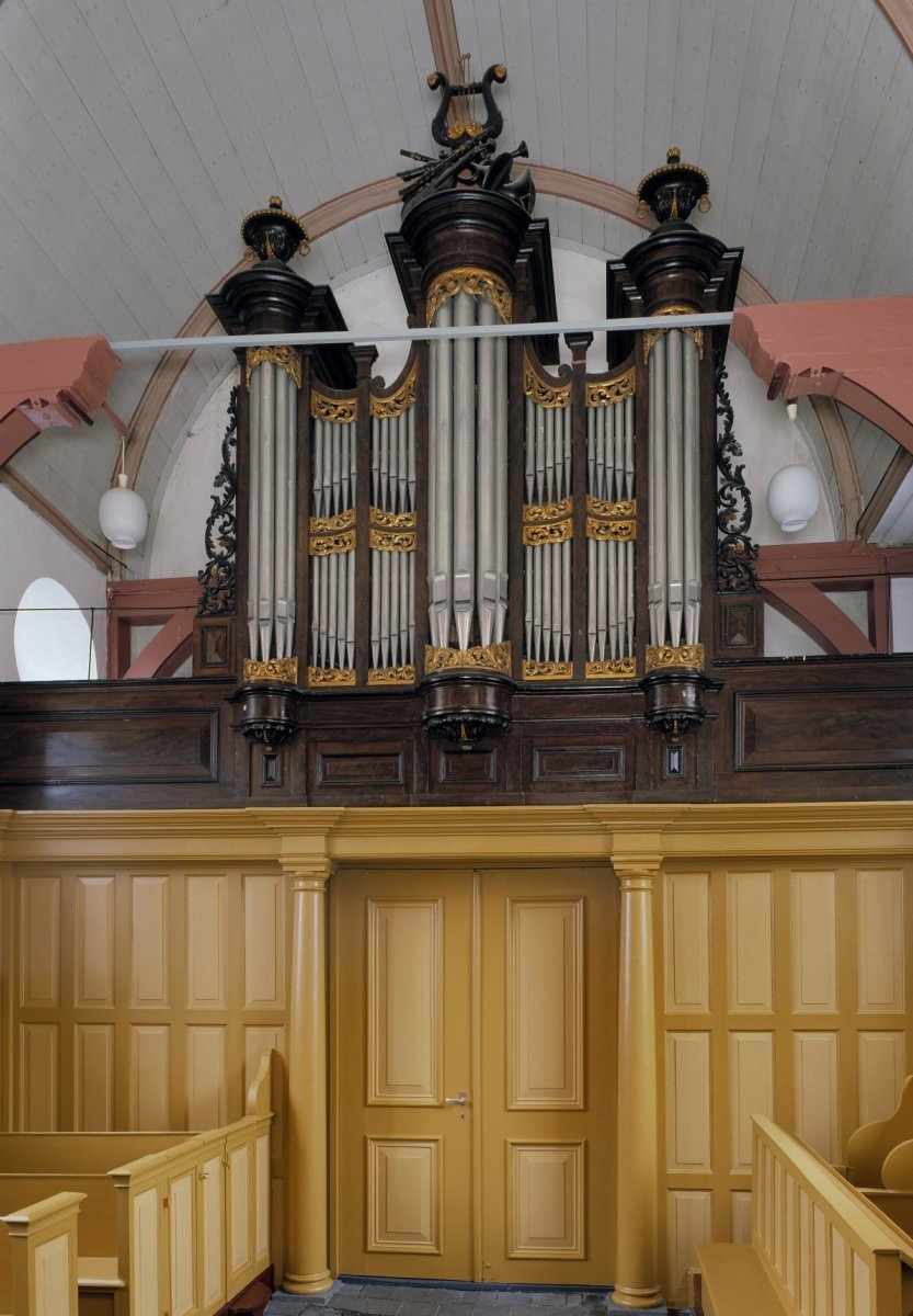 Nederlands Hervormde Kerk: Interieur, aanzicht orgel, orgelnummer 1323 (opmerking: Gefotografeerd voor Het Historische Orgel in Nederland 1858-1865)